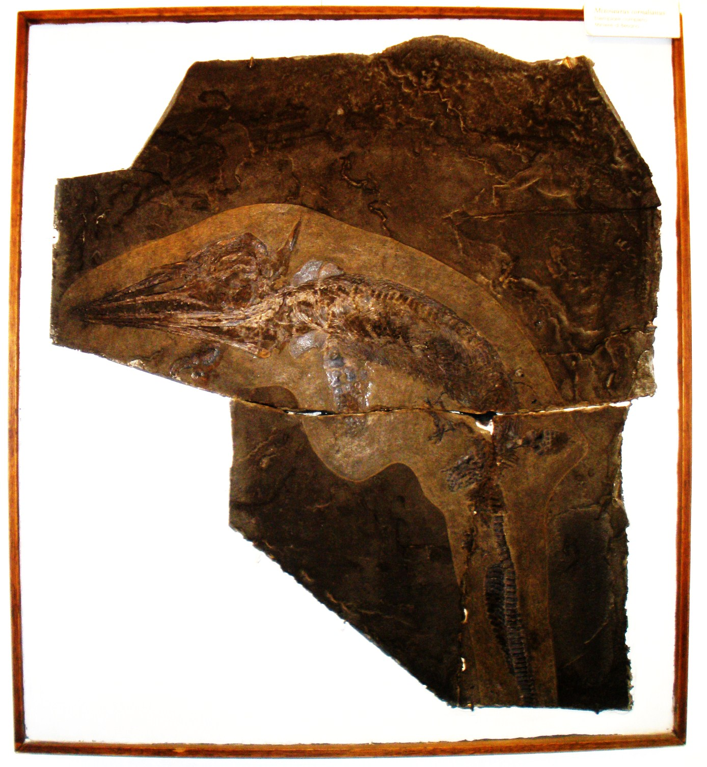 Fossil of Mixosaurus, an extinct reptile-- Took the photo at Museo dei Fossili di Besano